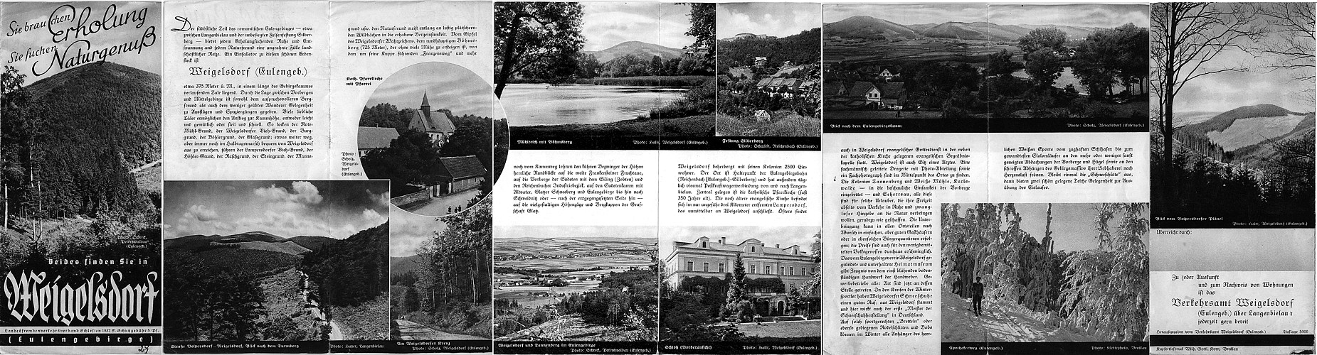 Boschuere Fremdenverkehrsamt Weigelsdorf 1937